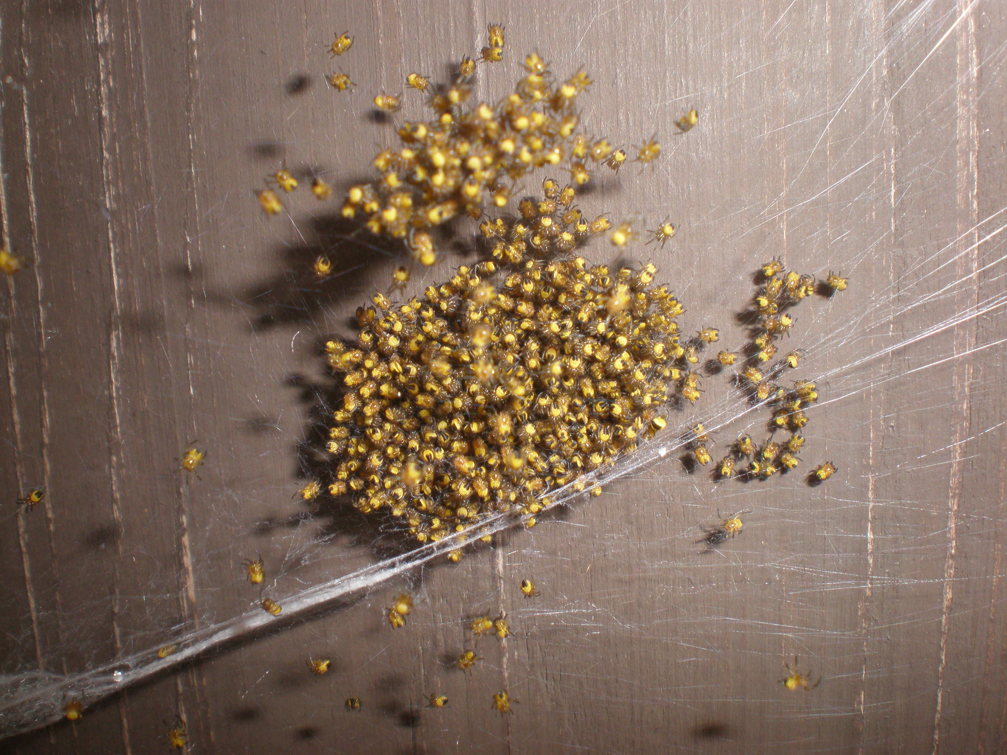 kokon